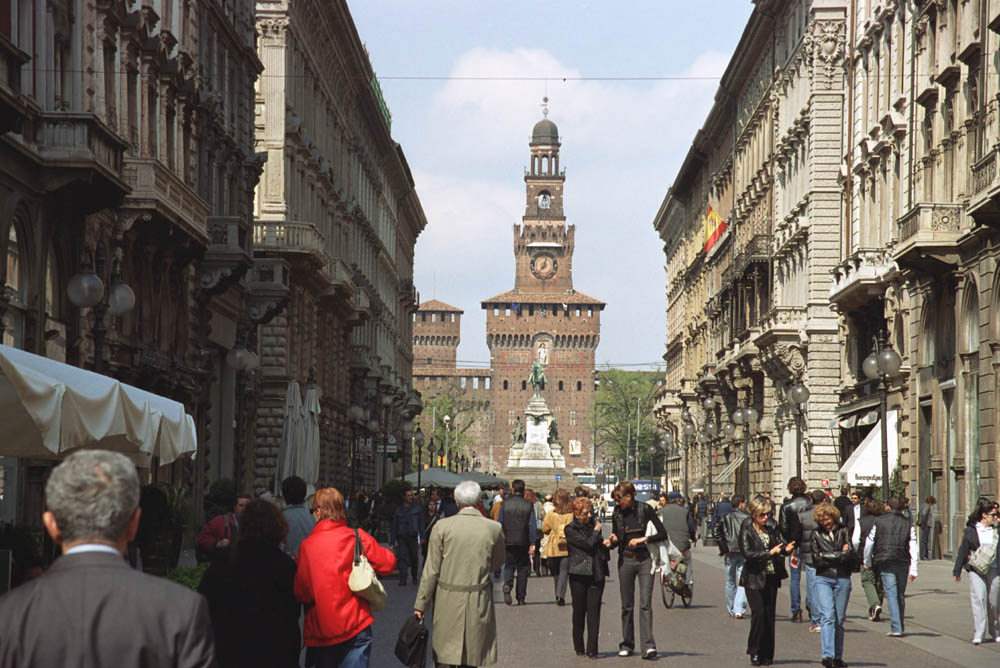 via Dante/Castello Sforza in Mailand